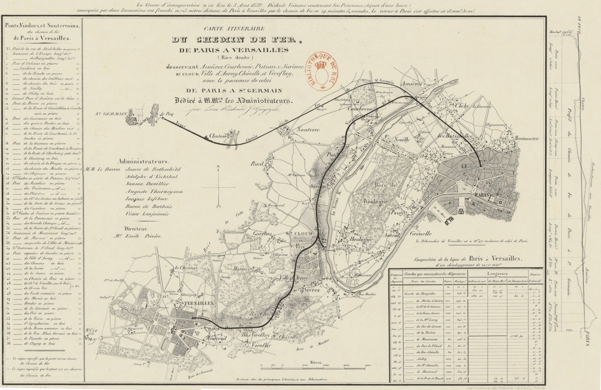 Carte itinéraire du chemin de fer de Paris à Versailles (rive droite) : desservant Asnières, Courbevoie, Puteaux, Surênes, St Cloud, Ville d'Avray, Châville et Viroflay ; avec le parcours de celui de Paris à St Germain par Léon Richard I[ngénieu]r géographe ; Dédiée à M.Mrs les Administrateurs Richard, Léon (18..?-18.. ; géographe). Cartographe Zakrzewski, Alexandre (1799-1866). Graveur Éditeur L. Letronne (Paris) Année 1839 domaine public